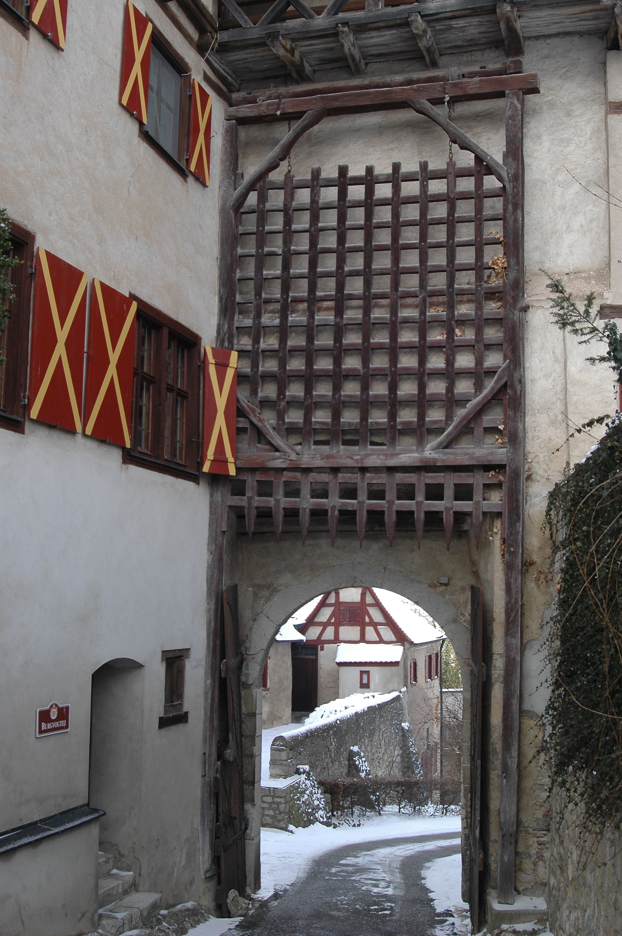 Fallgitter auf der Harburg, Johannes Prockl, Veröffentlichung für Wikipedia genehmigt vom Besitzer, dem Fürsten von Wallerstein, mit Schreiben vom 08.07.2005.